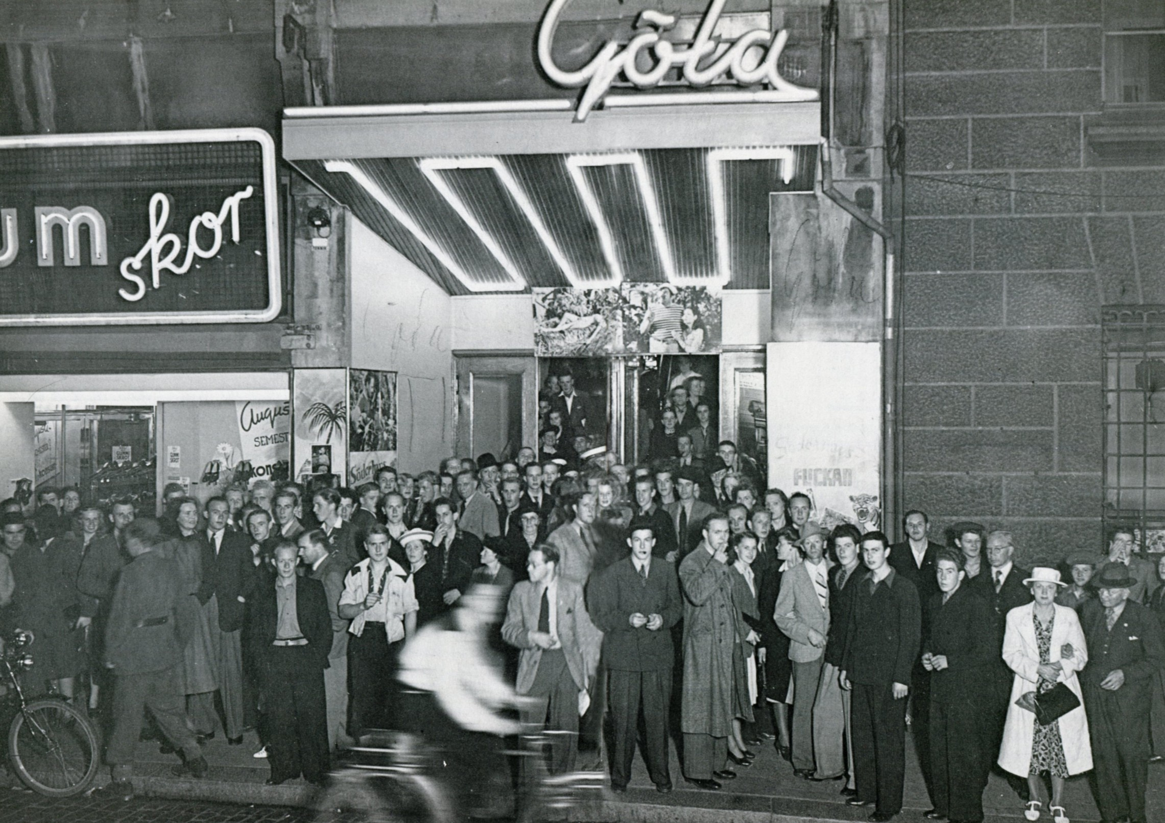 Biograf "Göta", Götgatan 14 i Stockholm återinvigningspremiär den 22 augusti 1942